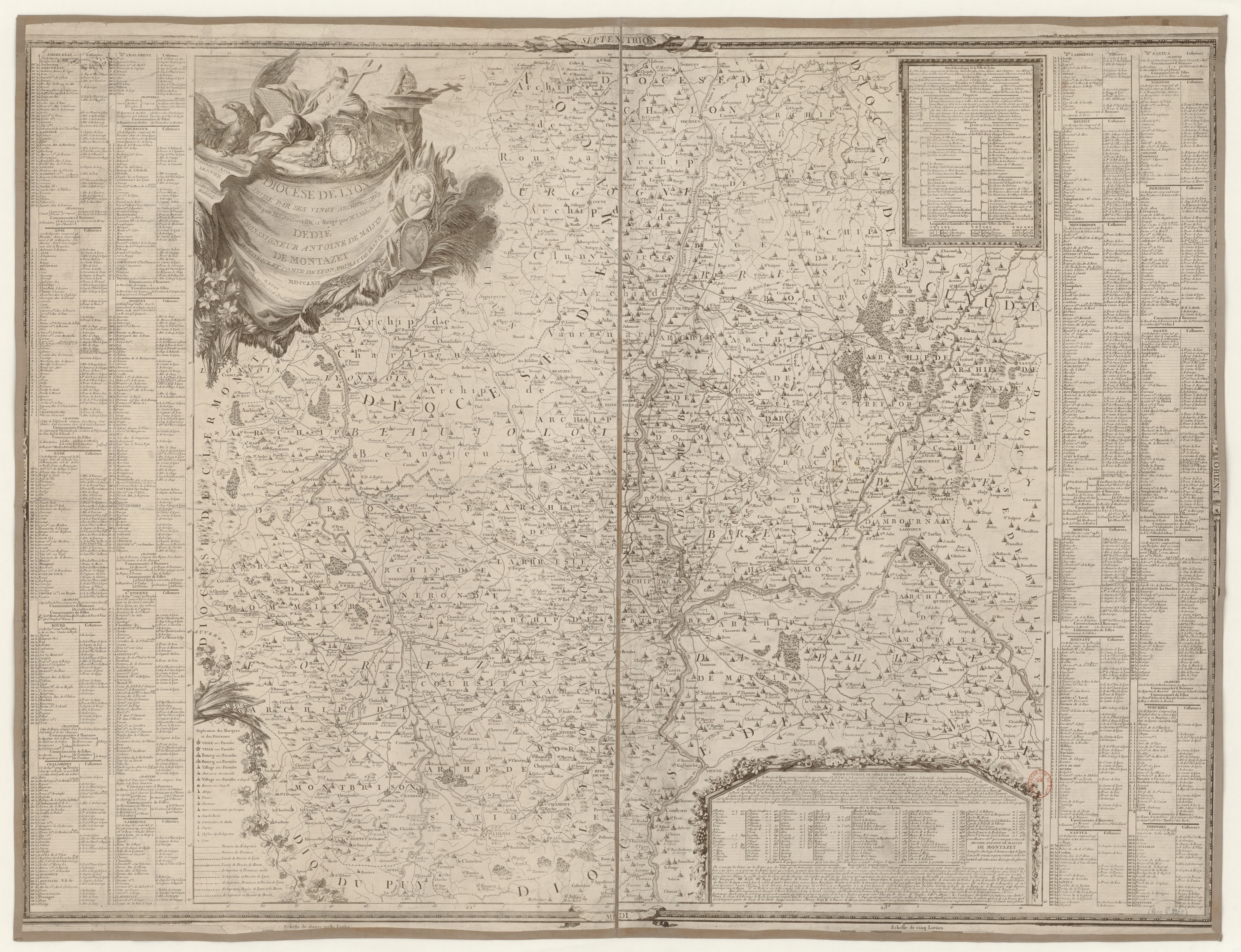 Diocèse de Lyon divisé par ses vingt Archiprêtrés / Dressé par Mr Joubert Fils ; et dirigé par M. l Abbé Berlié. Dédié à Monseigneur Antoine de Malvin de Montazet, Archevêque et Comte de Lyon, Primat de France, etc.